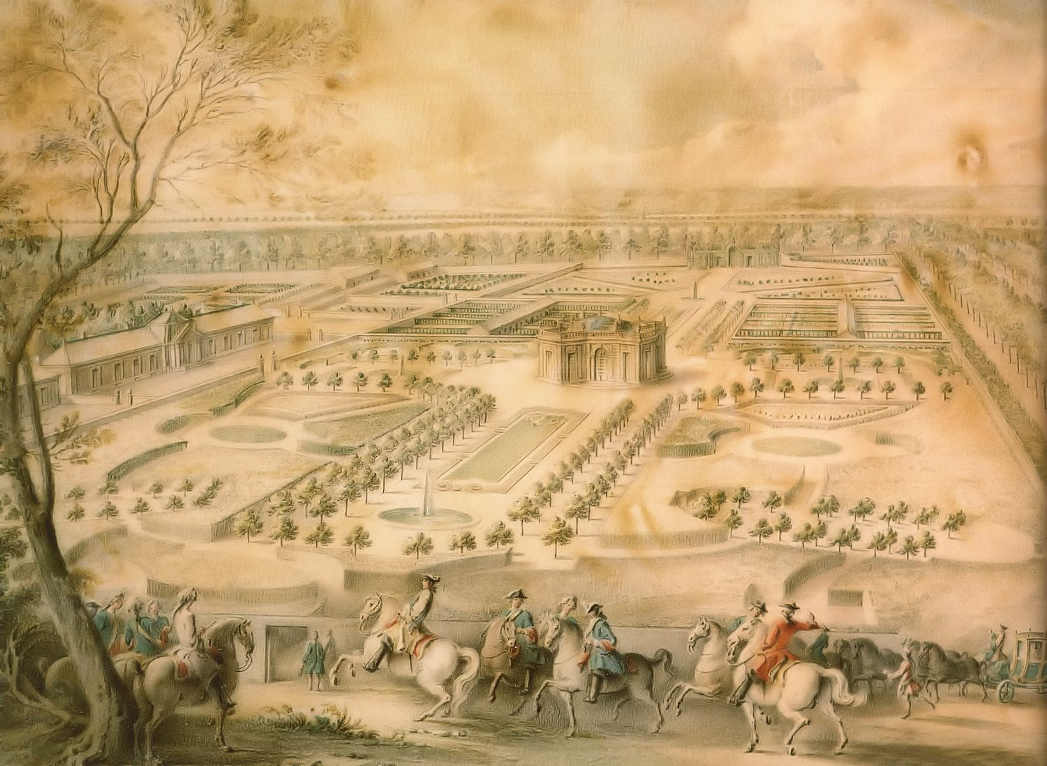 Louis XV en vue des jardins de Trianon, de la ménagerie domestique et des basses-cours, du Pavillon français et du portique de treillage - Jacques-André Portail - v.1750